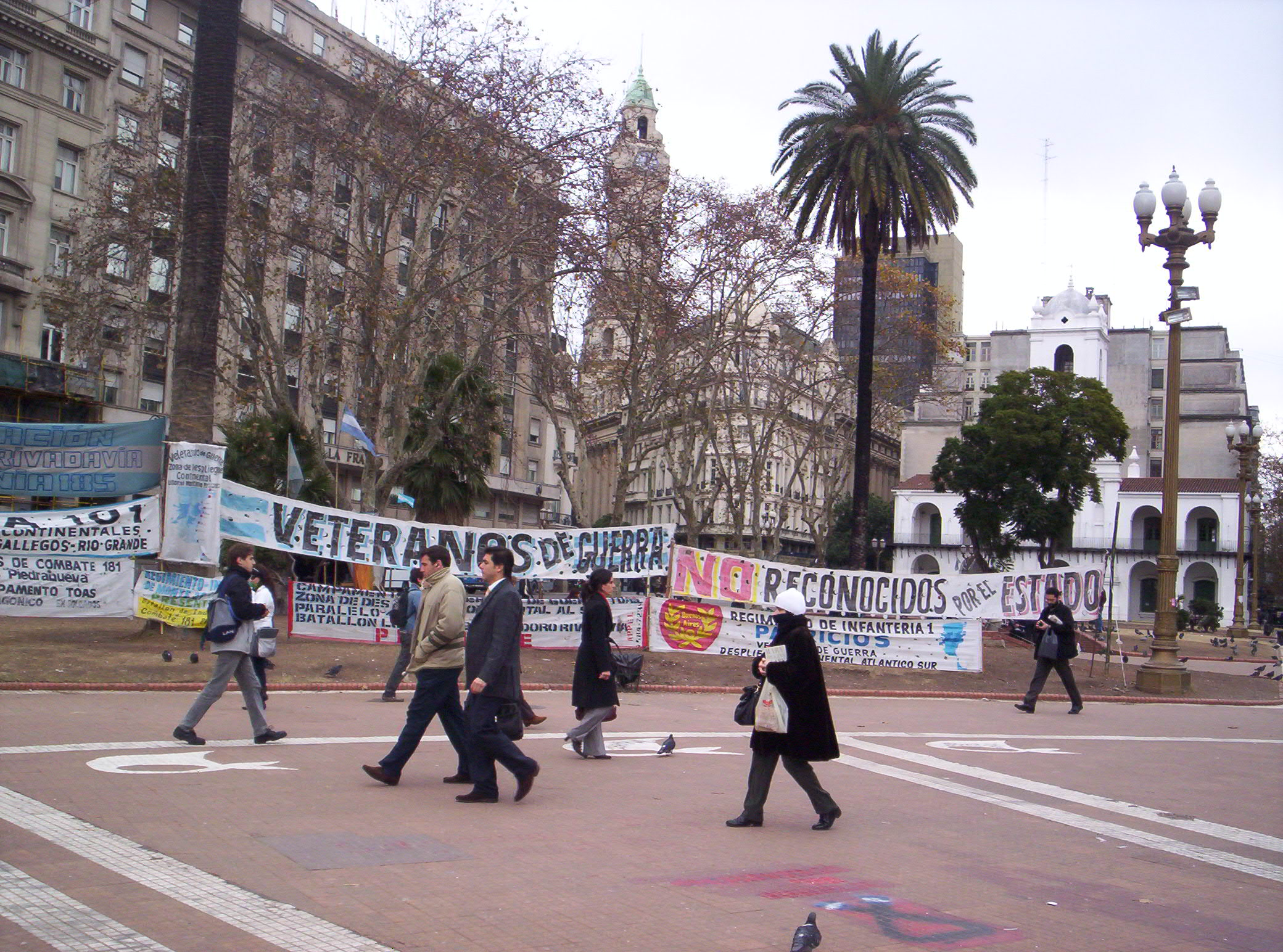 Protesta en Plaza de Mayo de ex conscriptos movilizados durante la Guerra de Malvinas